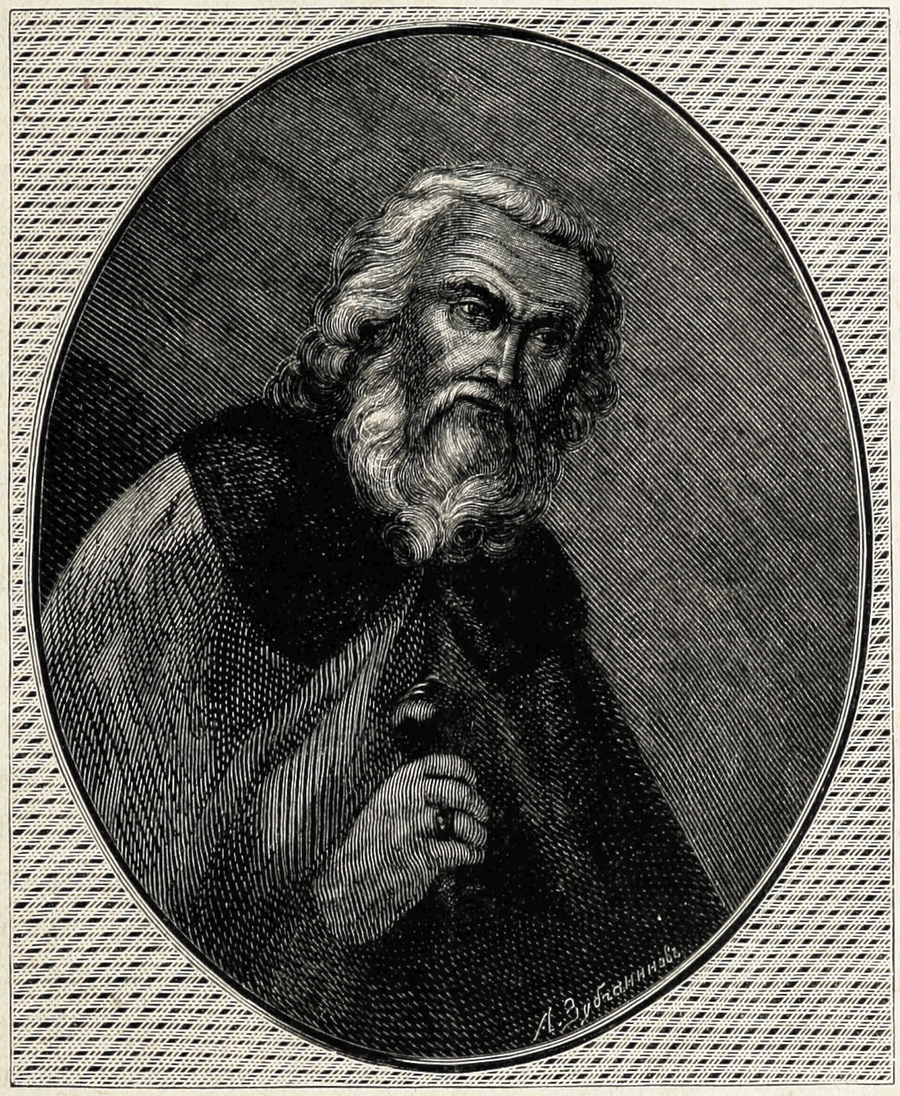 Беларуская (тарашкевіца): Партрэт Язэпа Руцкага (Jazep Rucki)